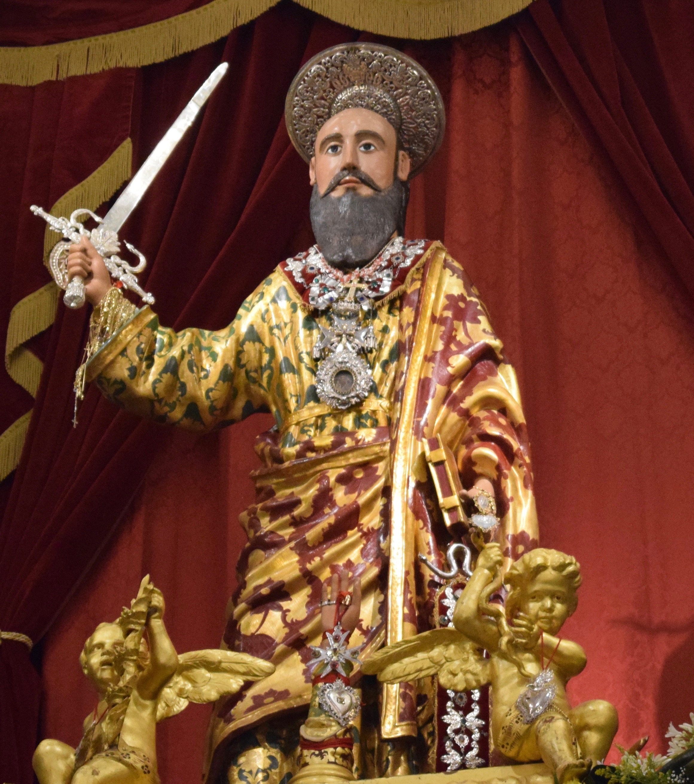 Fotografia di Michael Di Magro